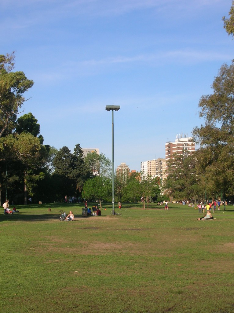 Foto del Parque Saavedra del barrio Saavedra - Ciudad de Buenos Aires